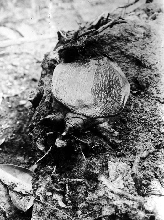 Repronegatief. Rivierschildpad (Trionyx cartilagineus) die alleen op de oever komt om eieren te leggen